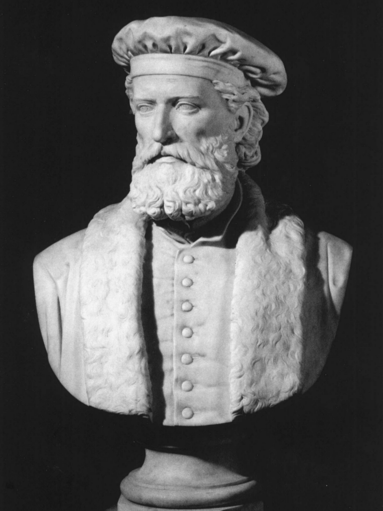 Busto di Marco Polo, opera di Augusto Gamba (1862-1863). Il busto fa parte del Panteon Veneto, conservato presso Palazzo Loredan di Campo Santo Stefano a Venezia.